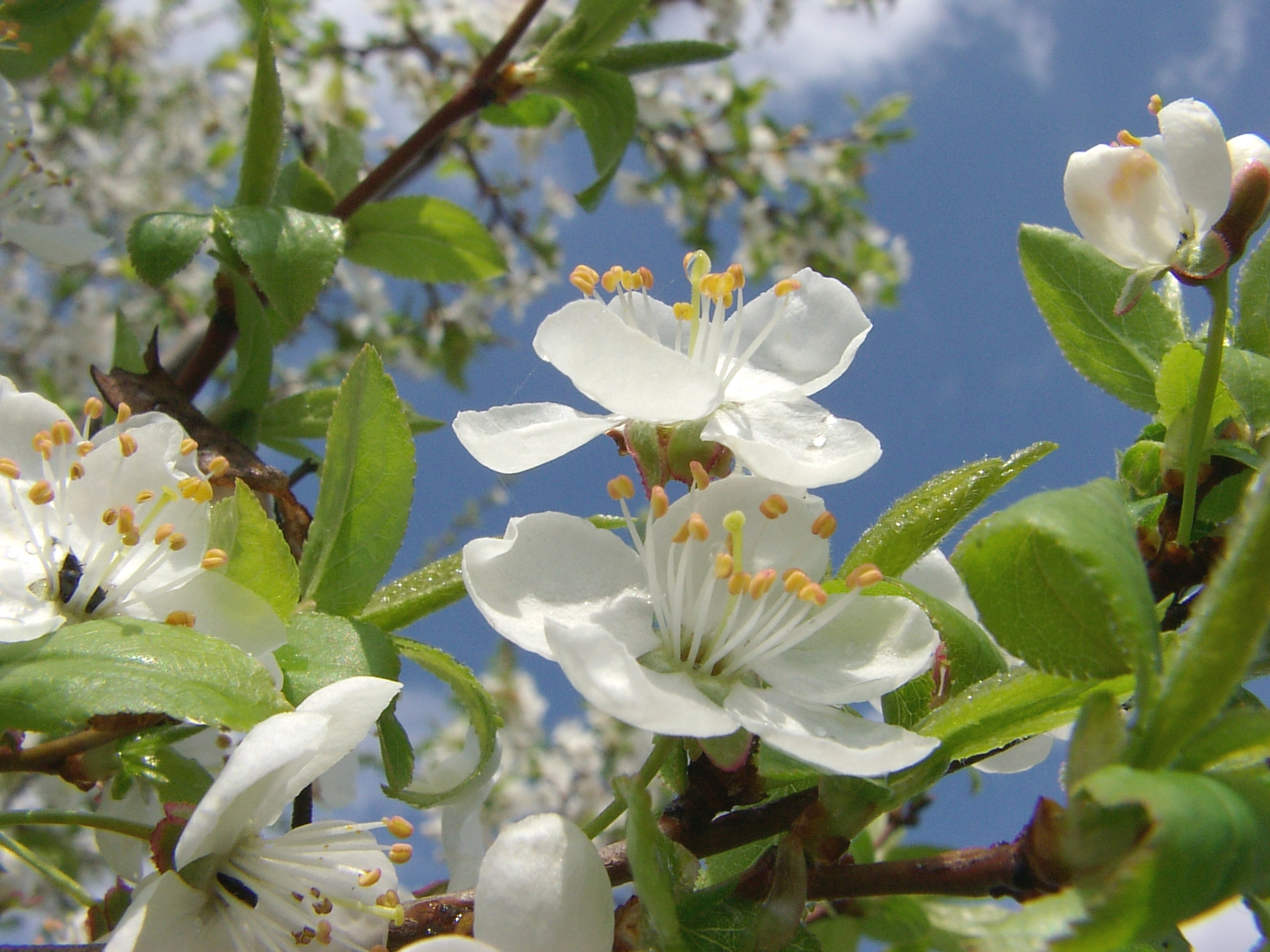 Kwiaty (wg fotografa wiśni, prawdopodobnie jest to śliwa [1]).